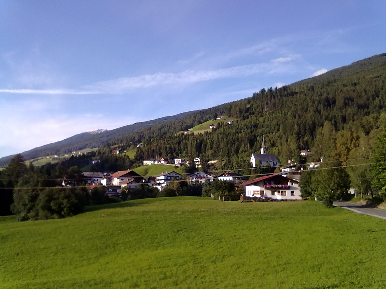 Gemeinde Pfons